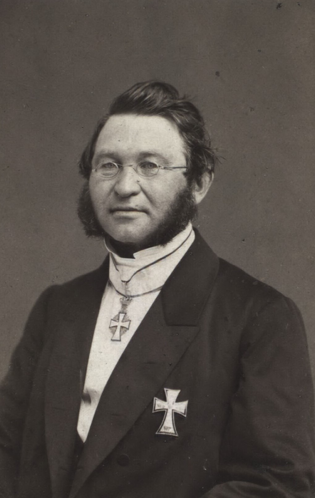 Christen Andreas Fonnesbech, (7. juli 1817 -17. maj 1880) var en dansk politiker.Han var konseilspræsident fra juli 1874 til juni 1875.